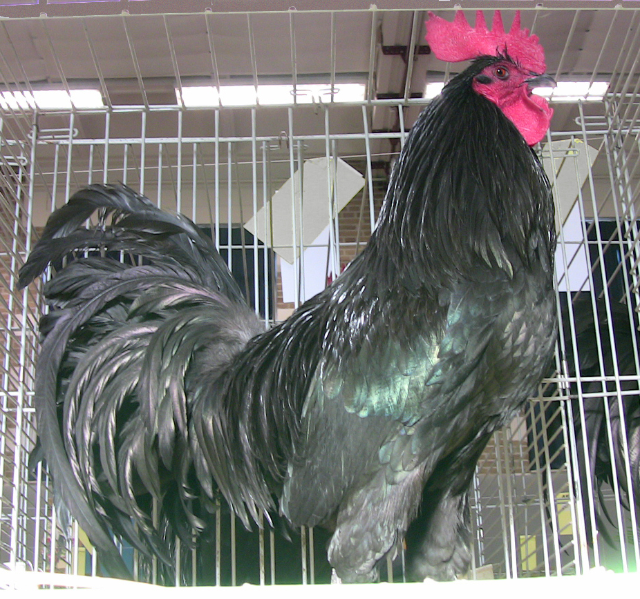 Tomaruhahn